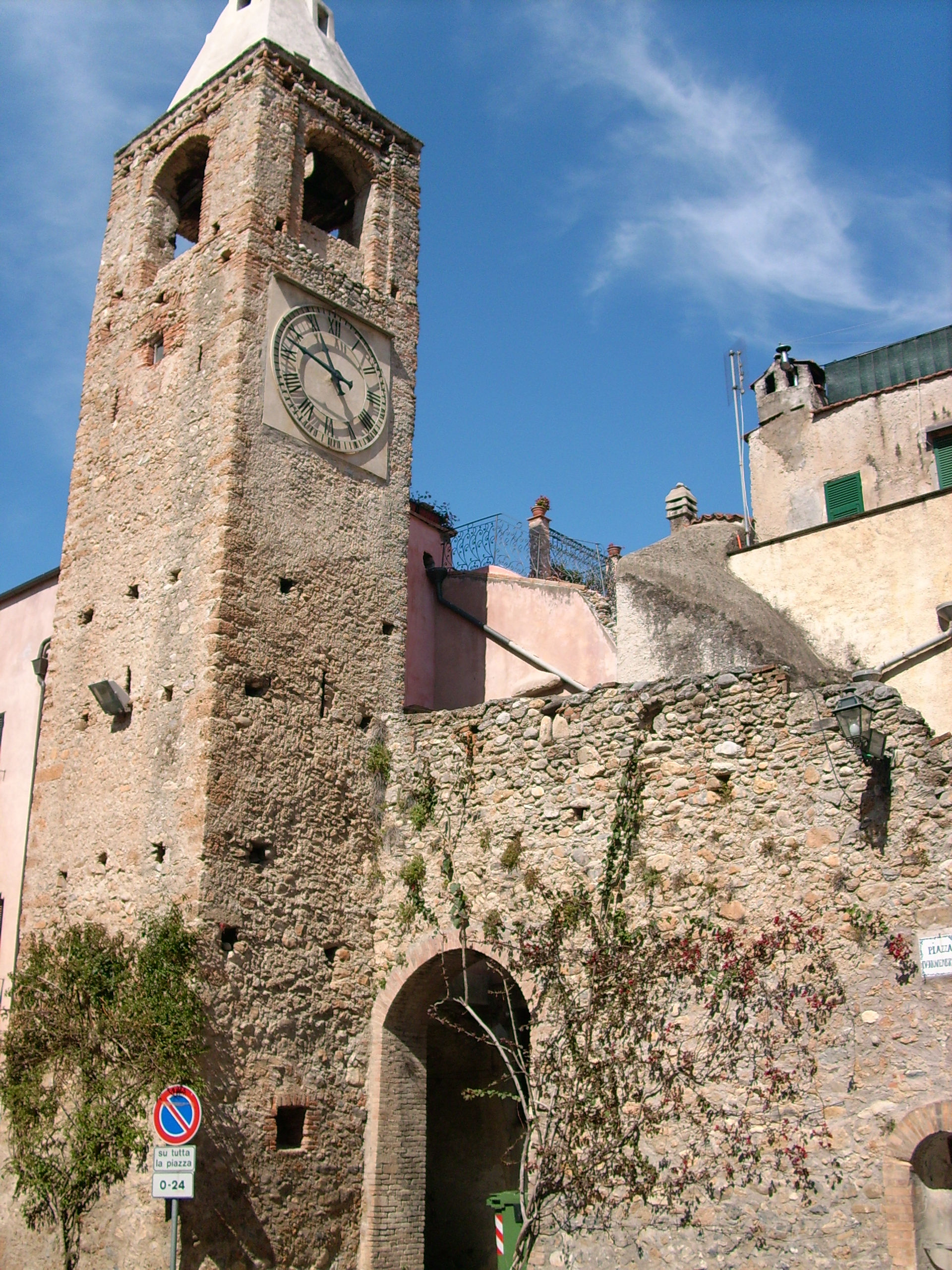 Chiesa di Santa Maria Maddalena presso Cisano sul Neva, Liguria, Italia